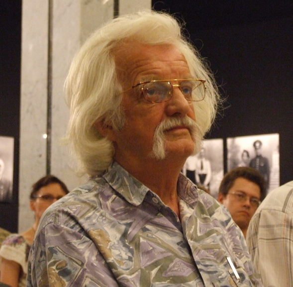 Henryk Jerzy Chmielewski (przedstawiciel jury) podczas prezentacji komiksu „Ocaleni" autorstwa Tomasza Bereźnickiego – laureata III edycji konkursu „Epizody Powstania Warszawskiego". Fot. Dawid Skoblewski. Warszawa, Dom Spotkań z Historią, Karowa 20.